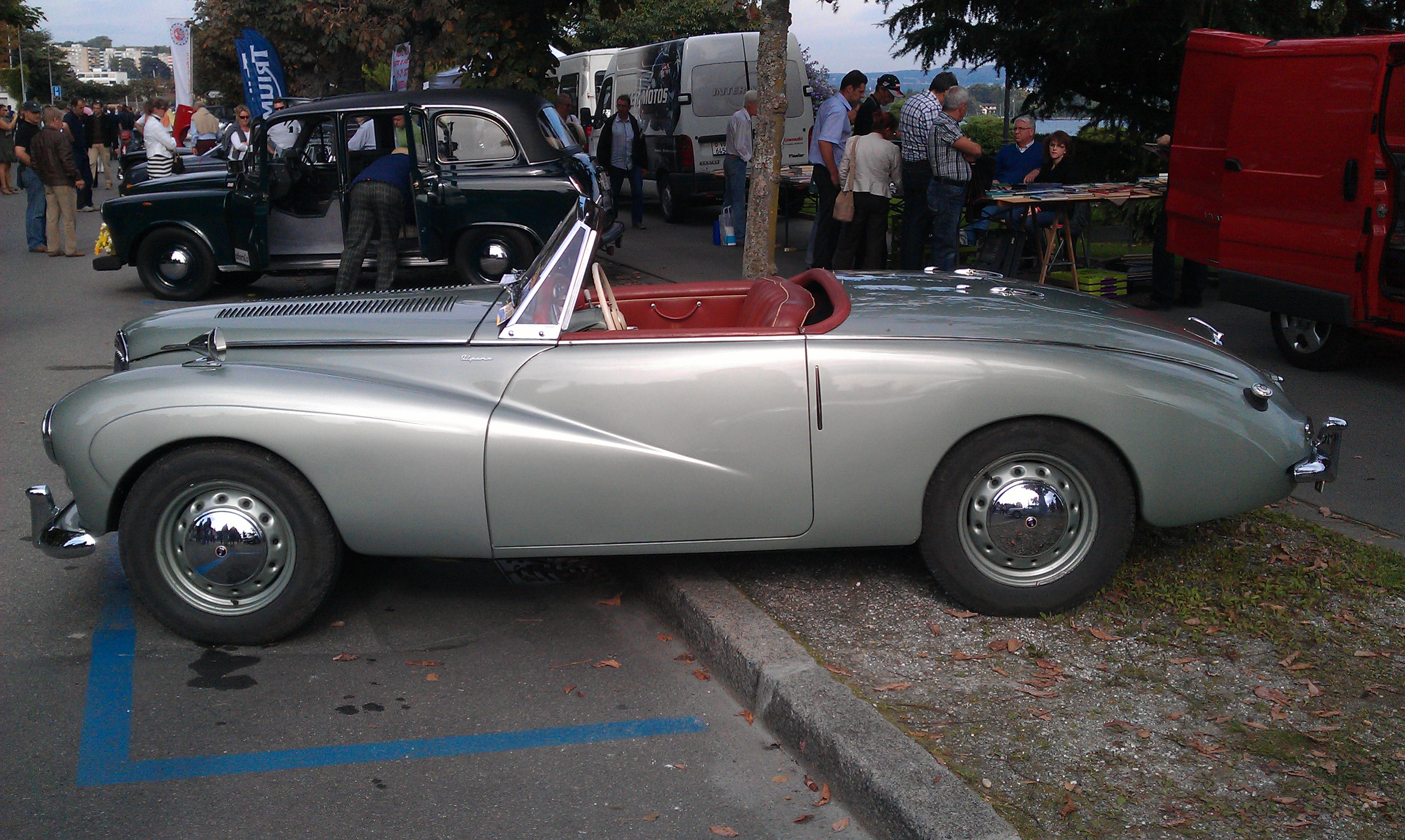 1954 Sunbeam Alpine Mk1